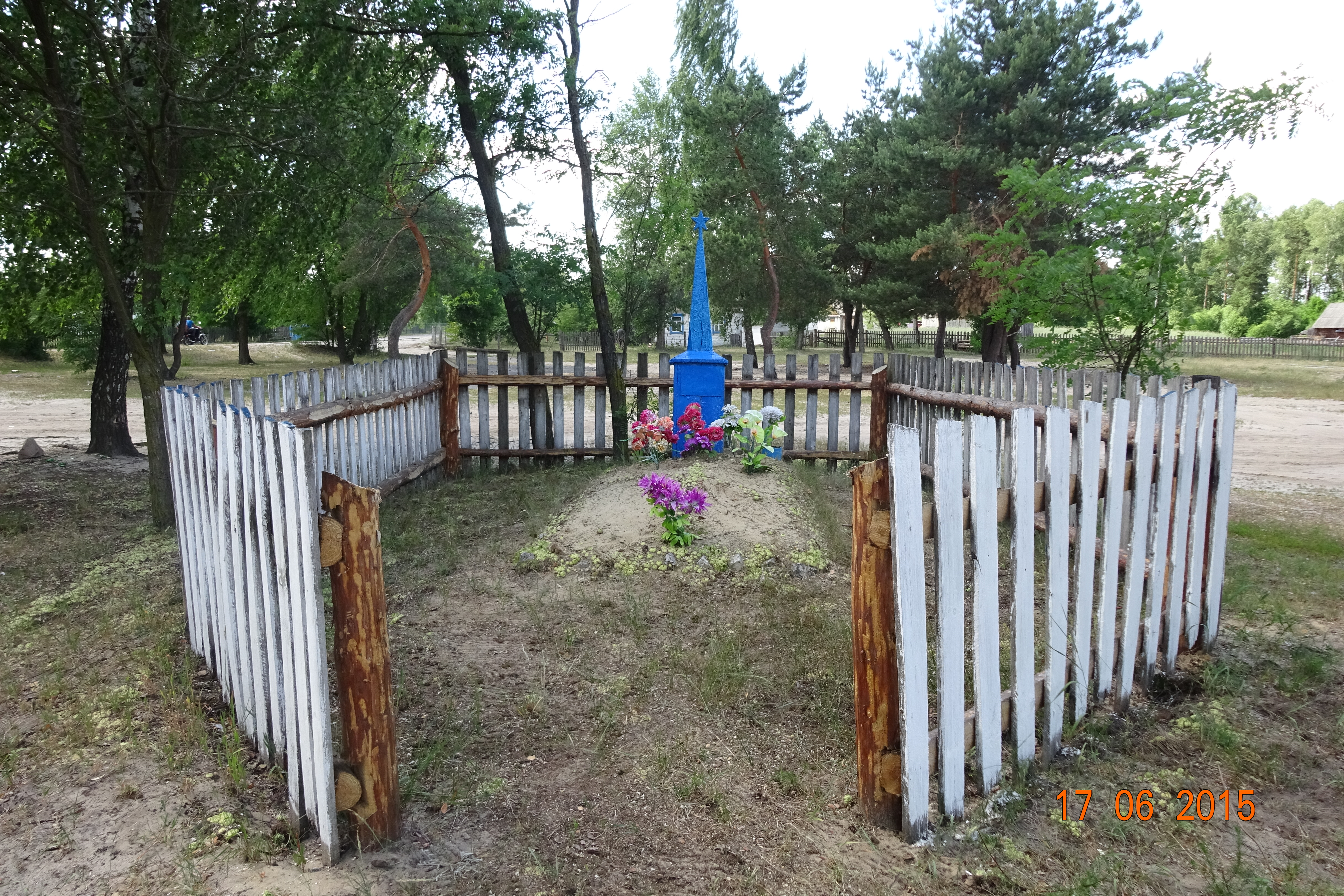 Братська могила партизанів. с. Березове, Рокитнівський район